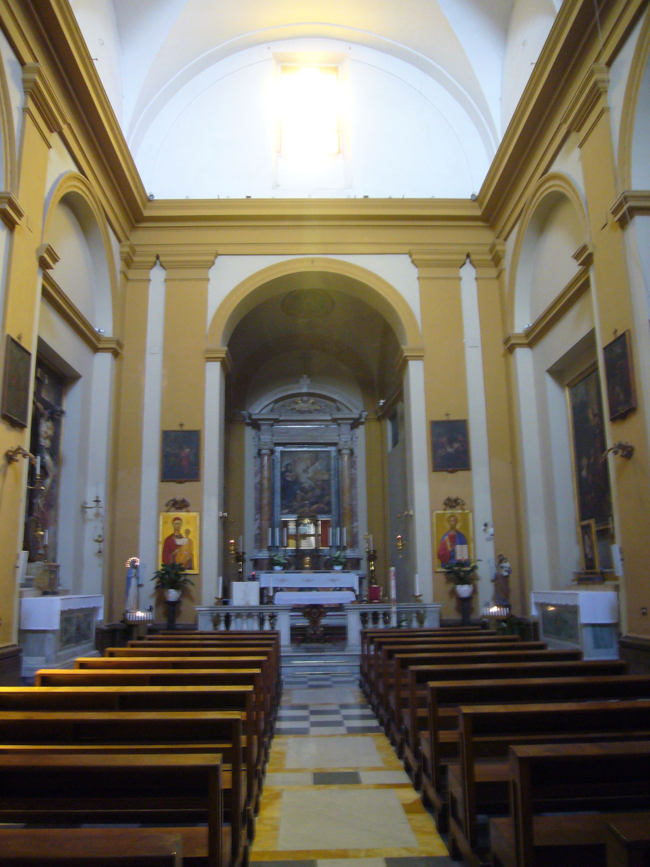 Roma, san Giuseppe a Capo le Case. Interno